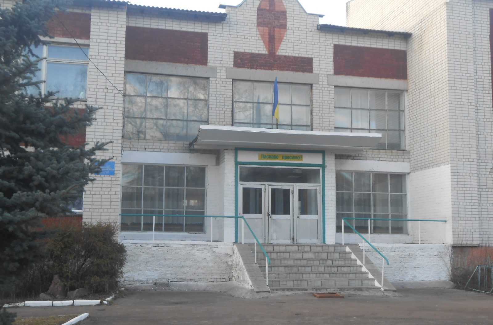 Школа в с. Нові Яриловичі